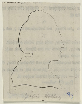 Katharina zu Stolberg um 1775/1778. Schwester des Christian (1748-1821) und des Friedrich Leopold (1750-1821) zu Stolberg-Stolberg